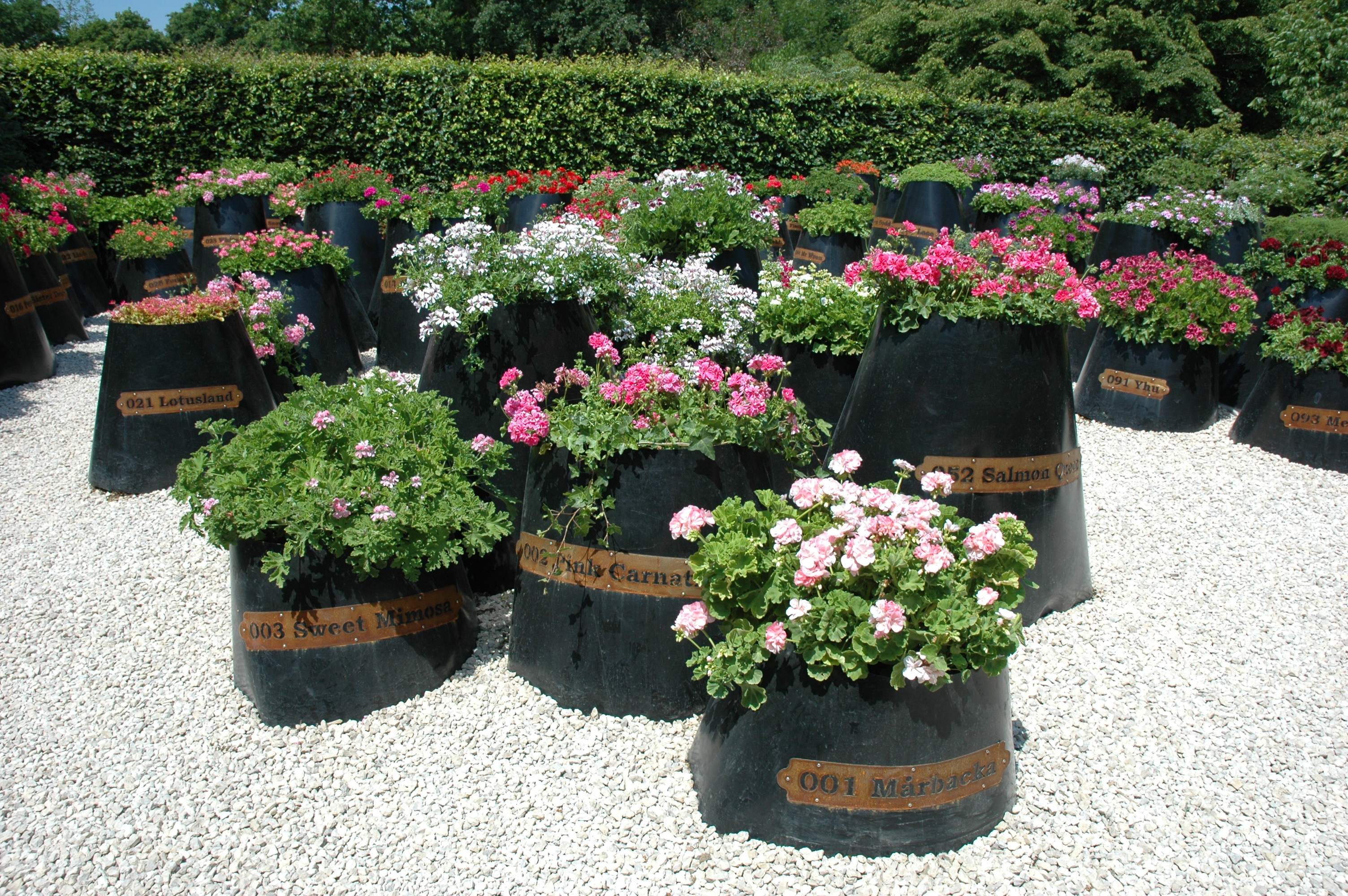 Le jardin des 101 pelargoniums